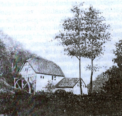 Die Mittlere Teufelsmühle vor 1900. Die Mühle wurde 1890 stillgelegt und das Gebäude1893 abgebrochen. Das heute bestehende „Blockhaus Teufelsmühle“ errichtete man 1909 auf den Grundmauern der Mittleren Mühle